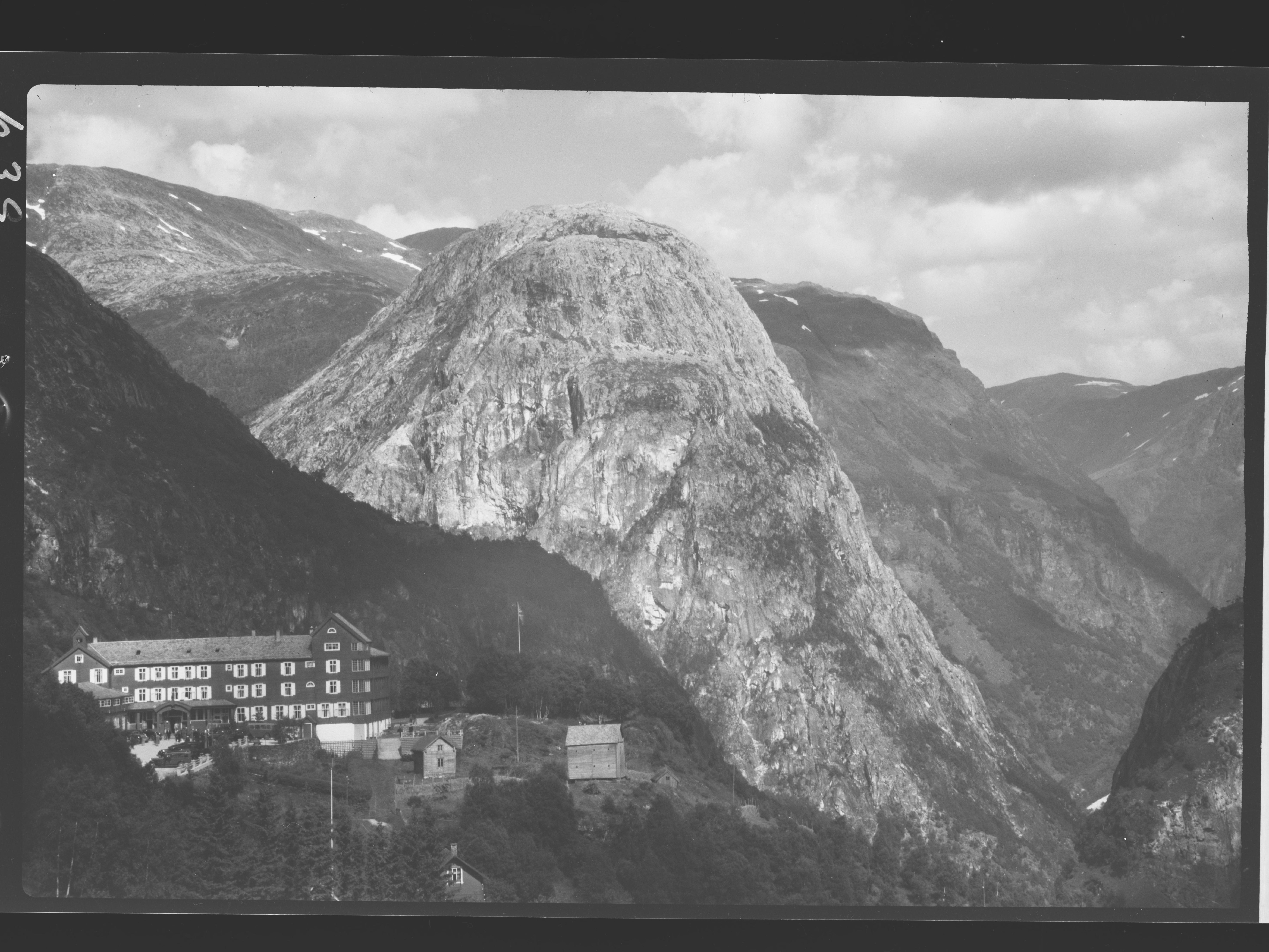 Bildet er hentet fra Nasjonalbibliotekets bildesamling. Anmerkninger til bildet var: Fotograf ukjent. Nærøydalen,Stalheim, Voss, Hordaland